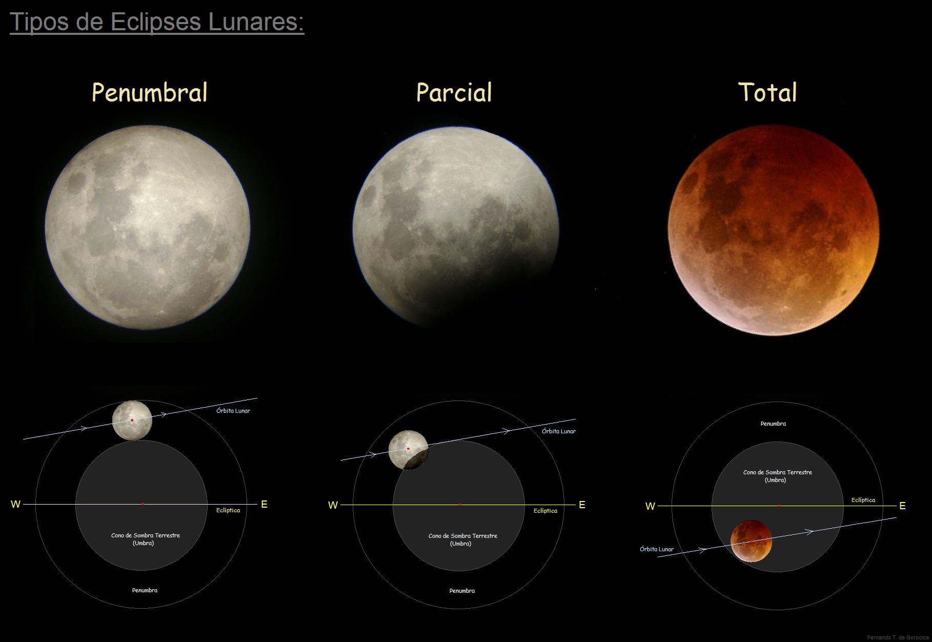 TIPOS DE ECLIPSES LUNARESː Los eclipses de Luna ocurren cuando el Sol, la Tierra y la Luna se encuentran en línea recta (elongación lunar 180°, fase "llena"). Los eclipses lunares se clasifican en 3 tipos dependiendo de la distancia angular desde el centro del cono de sombra terrestre (umbra) al nodo descendente o ascendente de la órbita lunar. Estos sonː 1° - los PENUMBRALESː la Luna llena pasa solamente por la zona de la penumbra del cono de sombra terrestre. Su luminosidad disminuye muy poco, por lo tanto no se percibe a simple vista y son de poco interés para el observador. 2° - los PARCIALESː la Luna llena no entra completamente en el cono de sombra de la Tierra, es decir parte queda en la penumbra y parte en la umbra, será entonces parcial. 3° - los TOTALESː la Luna llena entra completamente en el cono de sombra terrestre adquiriendo distintos colores desde un amarillento, anaranjado, cobrizo suave hasta uno oscuro. Verː Cono de Sombra Terrestre o Umbra. Ver próximos eclipses lunares (-721 a 2092) enː Saros o Ciclos de Eclipses Lunares. Notaː en la imagen, debajo de cada tipo de eclipse, el ángulo o inclinación de la órbita lunar con la eclíptica debería ser de 5,1454°. Es a manera ilustrativa. Ver Eclipses lunares desde Argentina.